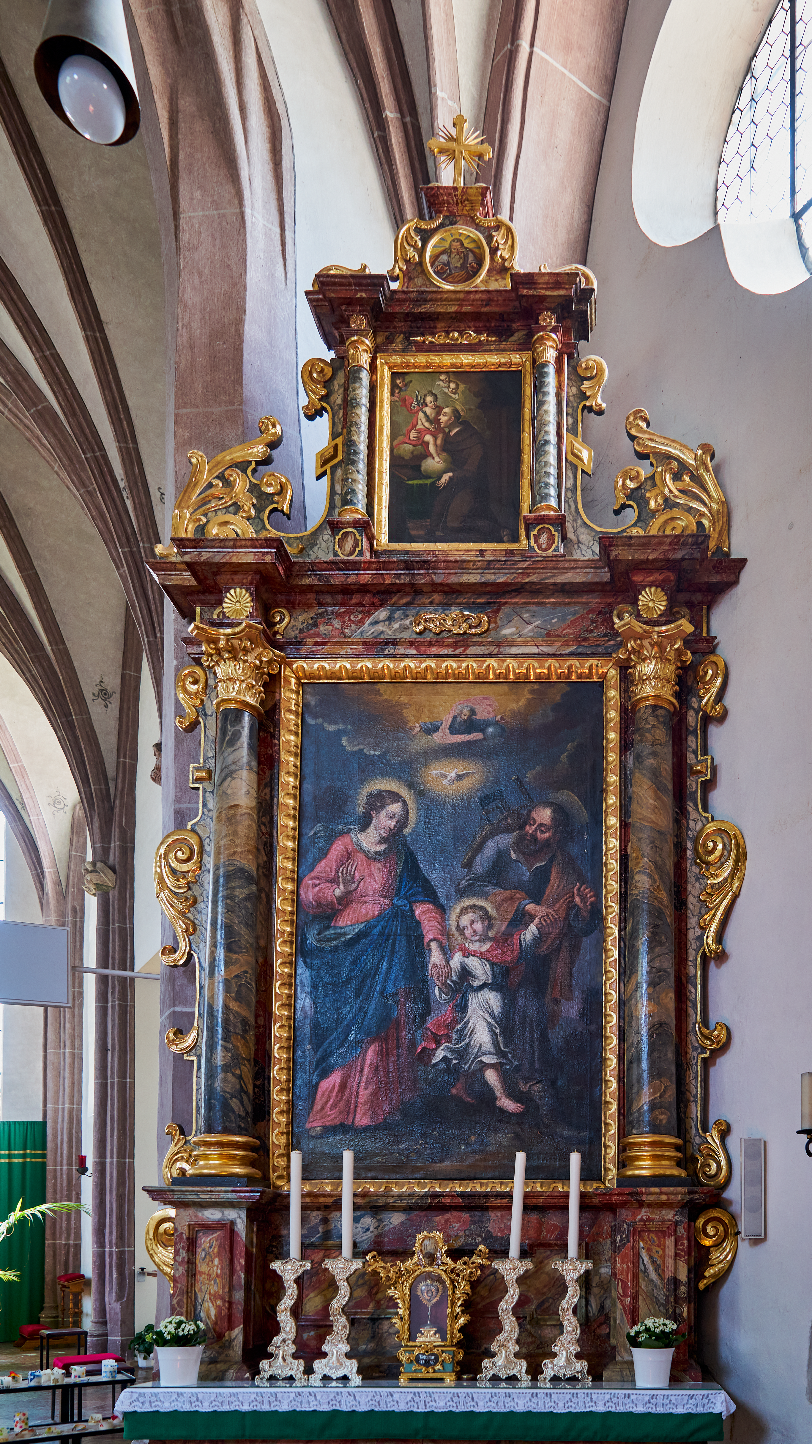 Katholische Pfarrkirche Mariä Himmelfahrt Kirchdorf am Inn, rechter Seitenaltar